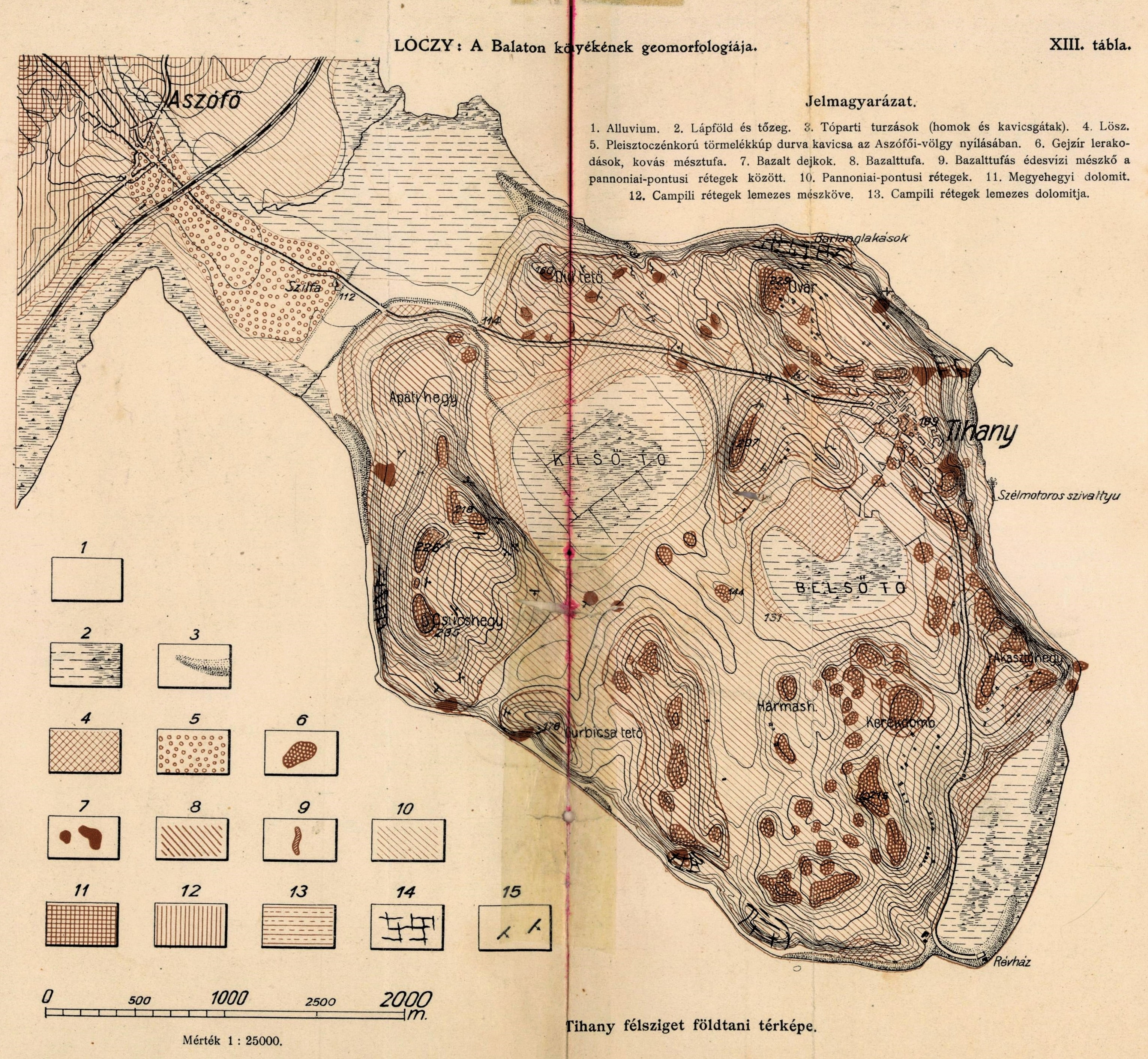 Tihany félsziget földtani térképe Lóczi Lóczy Lajos: A Balaton tudományos tanulmányozásának eredményei I. kötet A Balaton környékének geomorfológiája